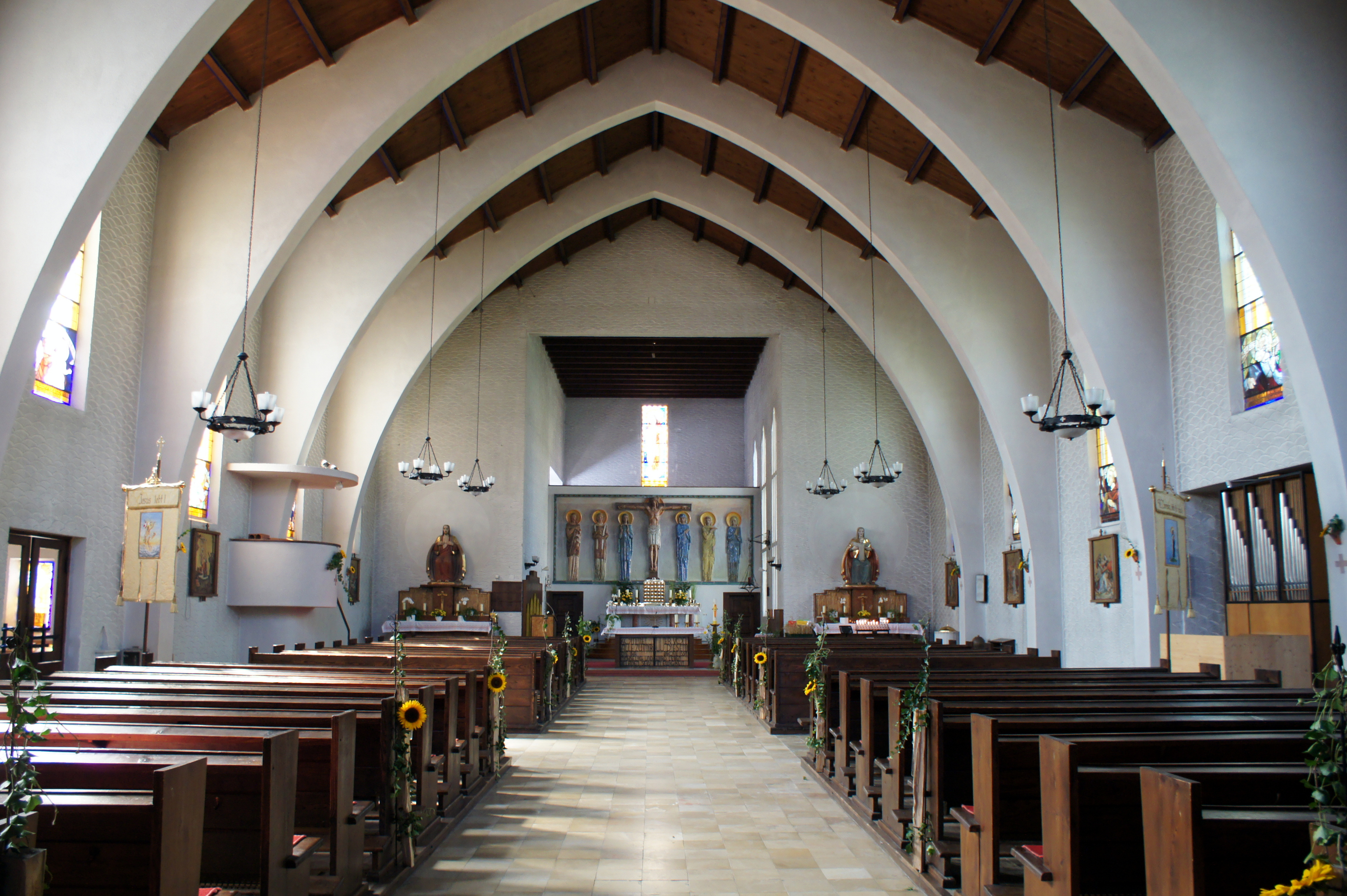 Kath. Pfarrkirche hl. Theresia vom Kinde Jesu